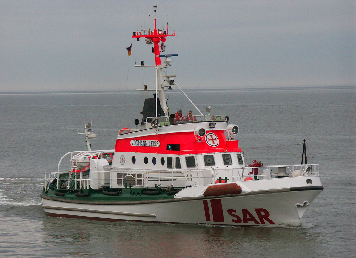 SK Vormann Leiss vor Pellworm